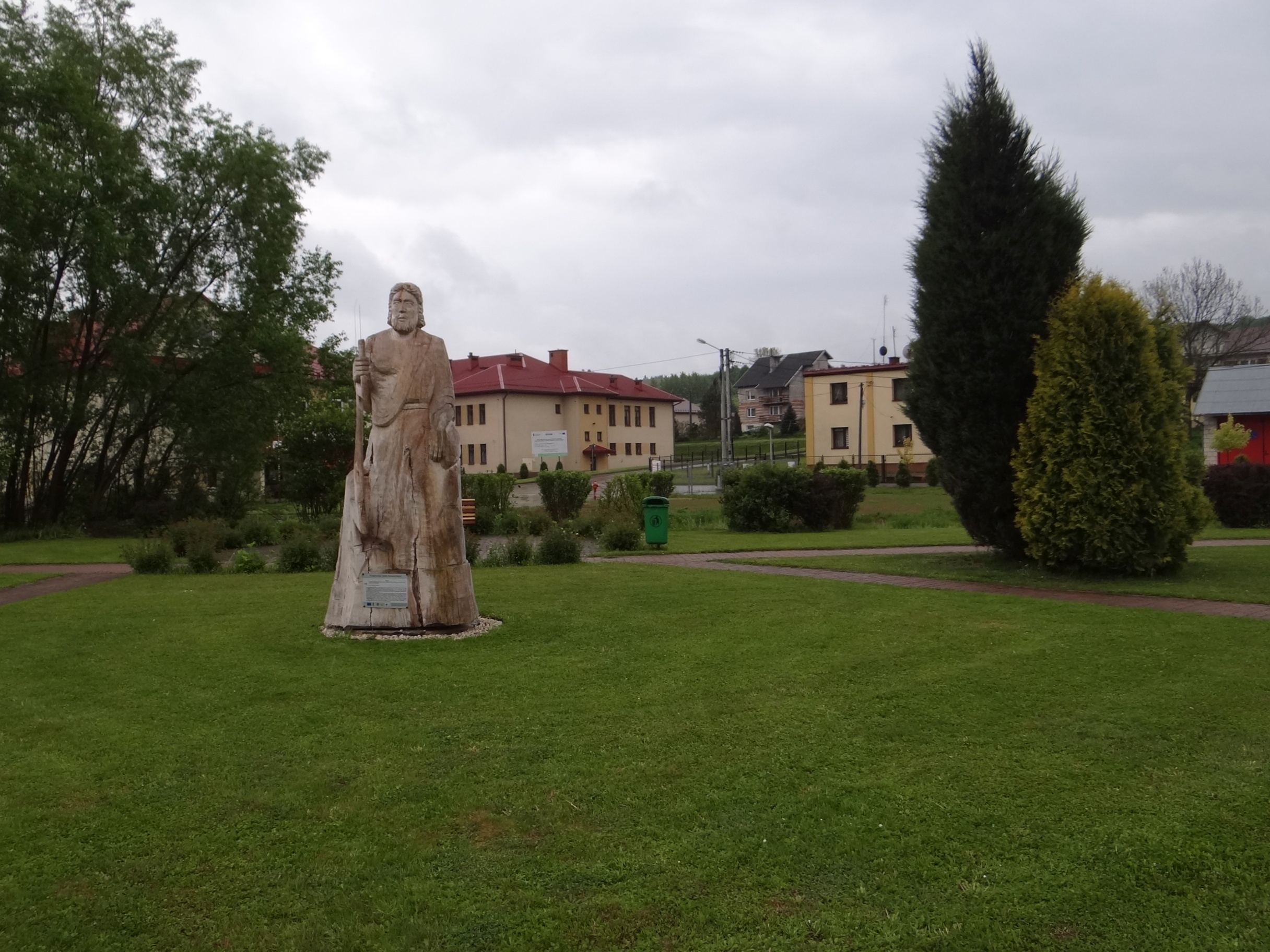 Rzepiennik Strzyżewski